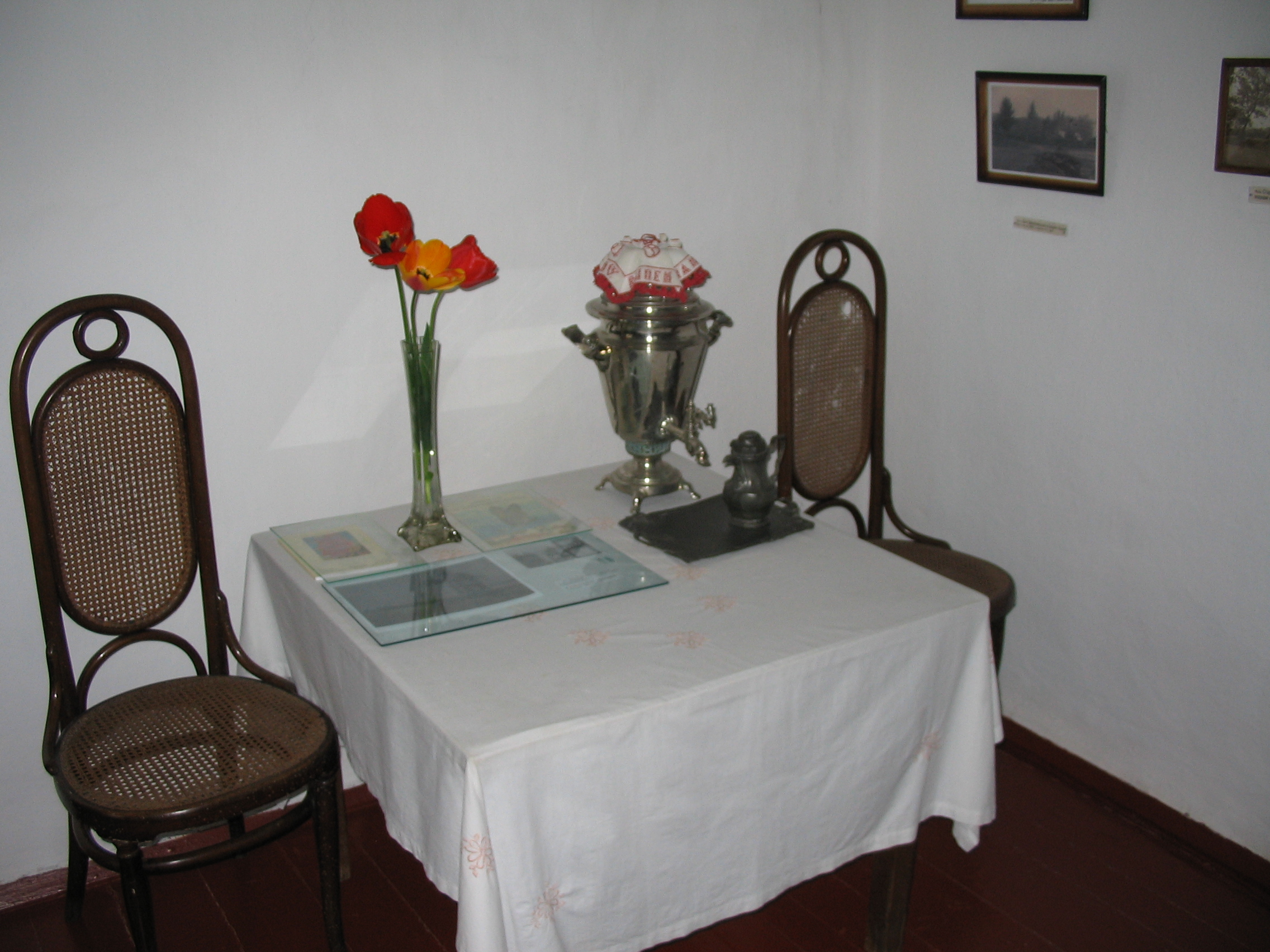 Дом-музей грина в Старом Крыму